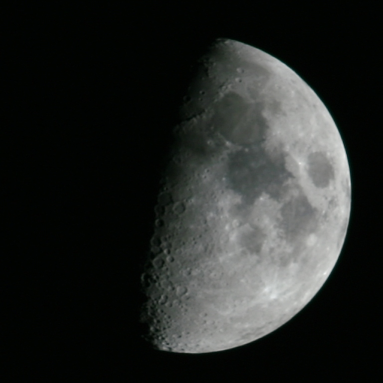 Etwas mehr als Halbmond, fotografiert mit einer Canon EOS 350D und einem EF-M42-Adapter und einem M42-Pentacon-Six-Adapter, und dem 300mm 1:4 Orestegor von Meyer-Optik Görlitz DDR. Ich habe bei Blende 16 15 Bilder gemacht, und diese mit ale ( zusammengerechnet, und mit Gimp den Kontrast angepasst und etwas geschärft.